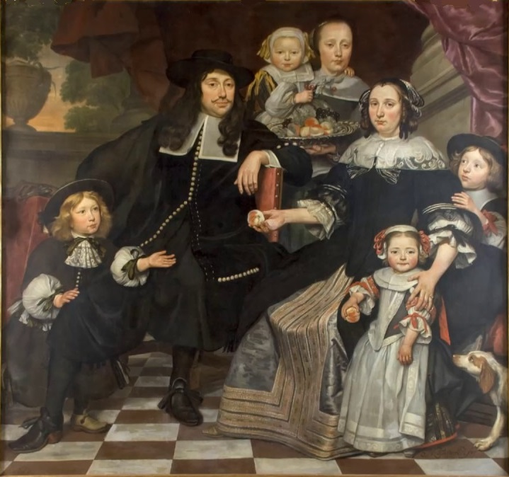 Familiegroep op het terras van een buitenverblijf. oil on canvasmedium QS:P186,Q296955;P186,Q4259259,P518,Q861259. 194 × 208 cm (76.3 × 81.8 ″). Stedelijk Museum Zwolle. Vroeger Rijksmuseum Amsterdam (SK-A-295).